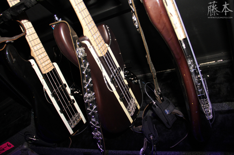 Passagem de som - HSBC Brasil - São Paulo/SP - 11/09/2011